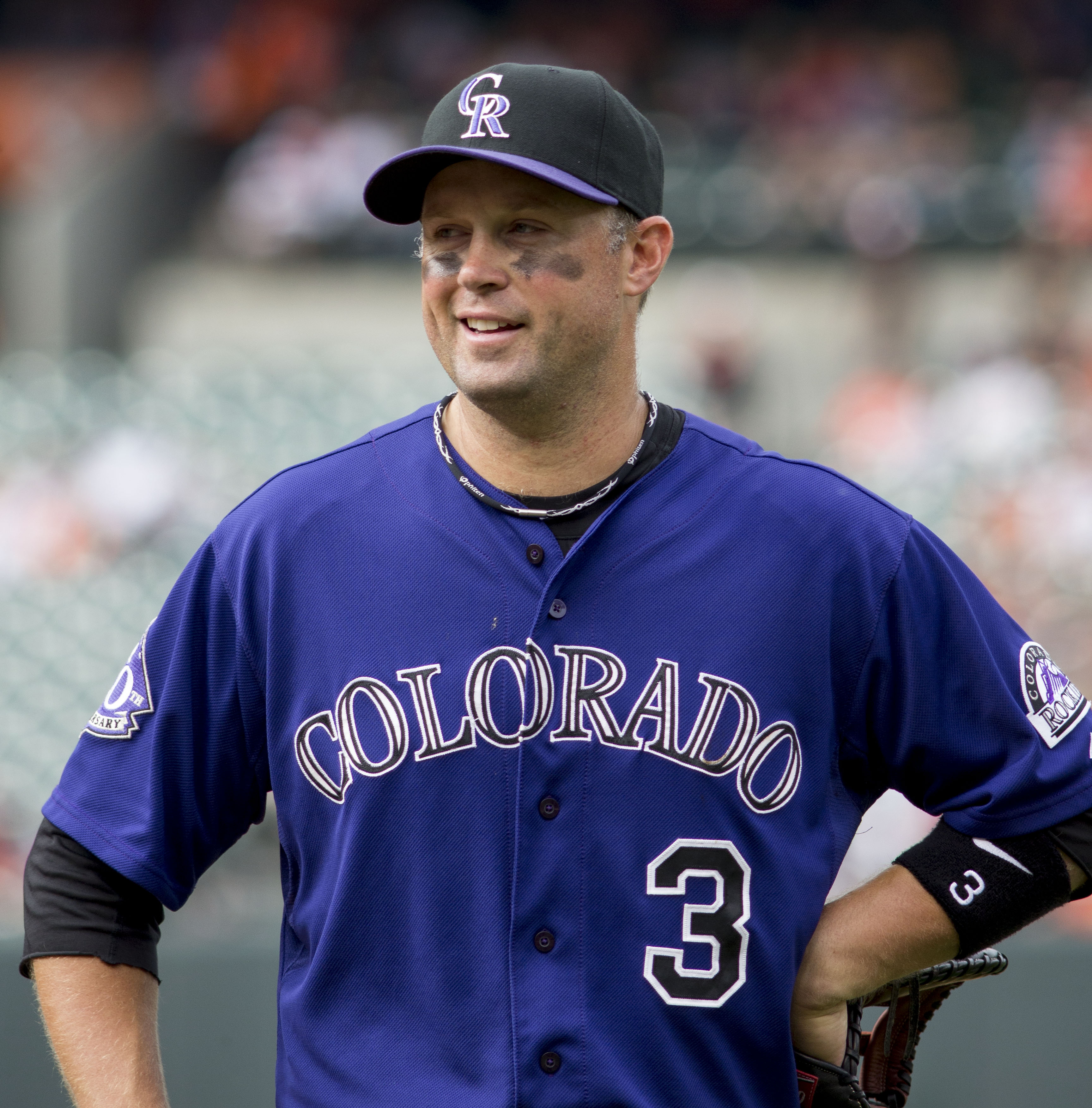 Michael Cuddyer